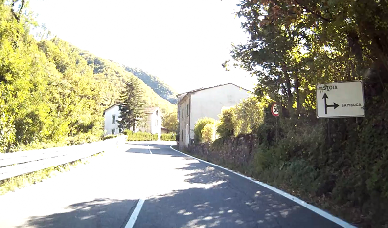 Sambuca Pistoiese, frazione Bellavalle